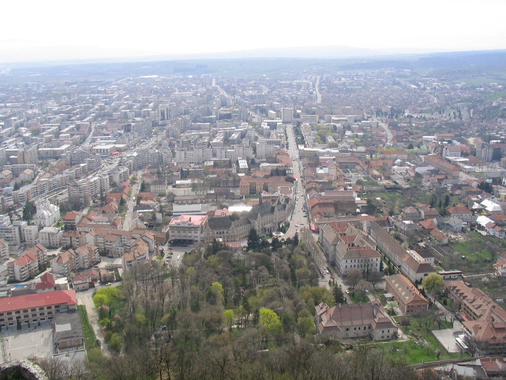 Deva